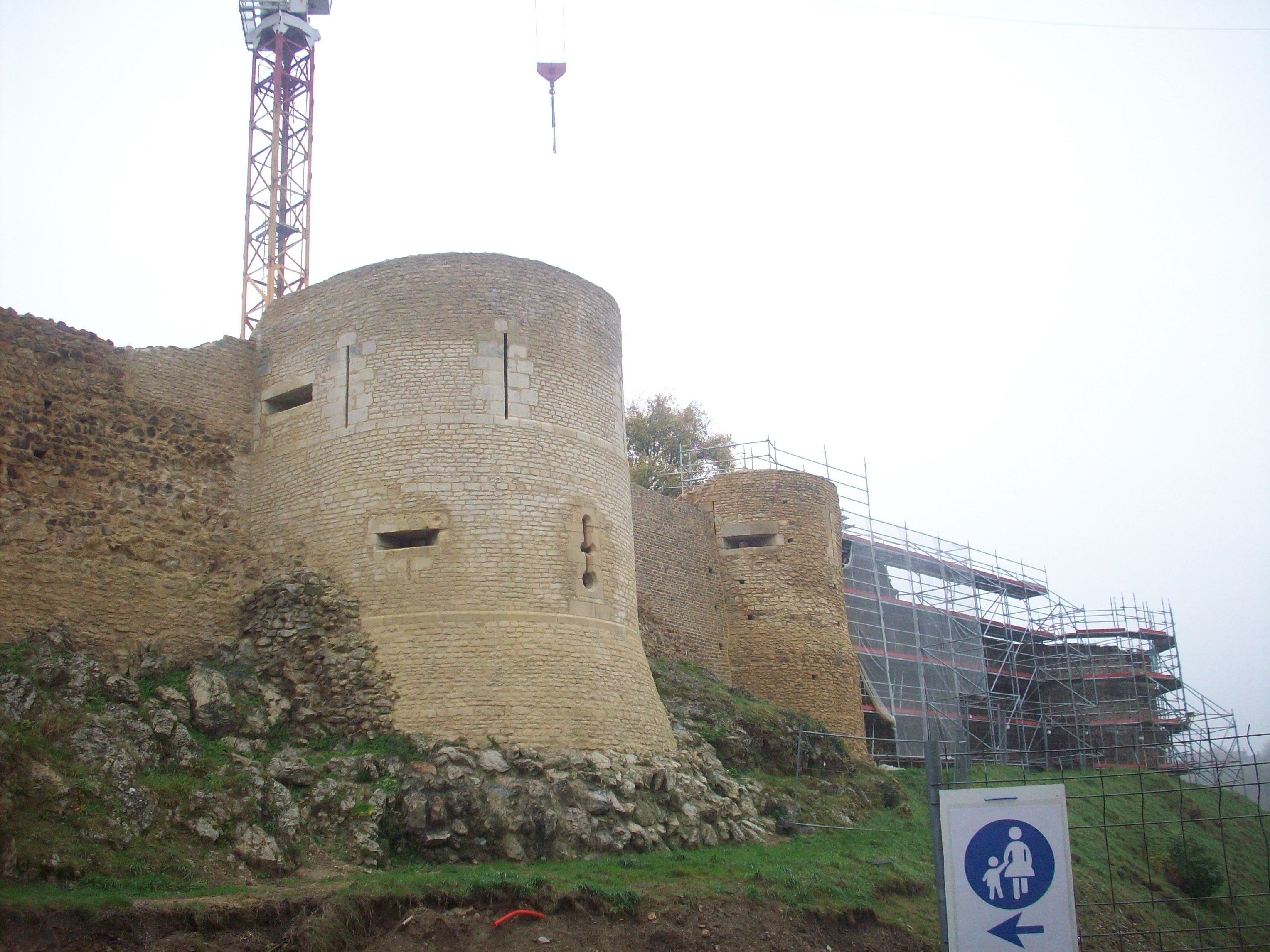 Fortifications de Falaise.